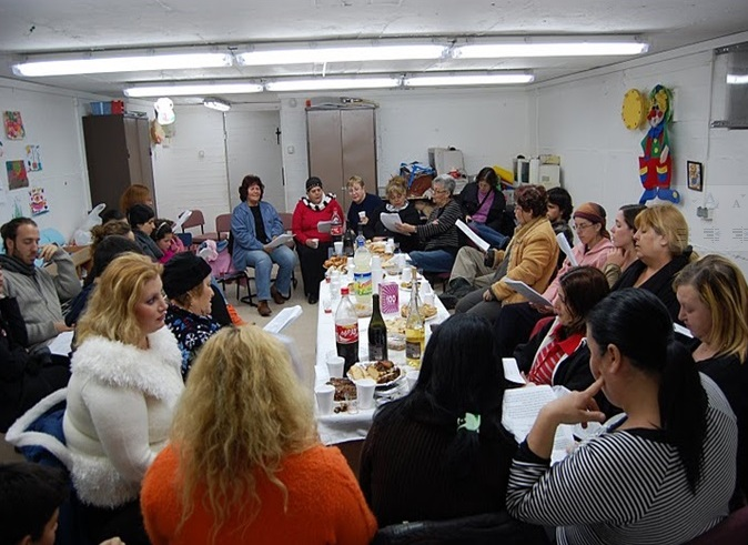 קהילה חוגגת